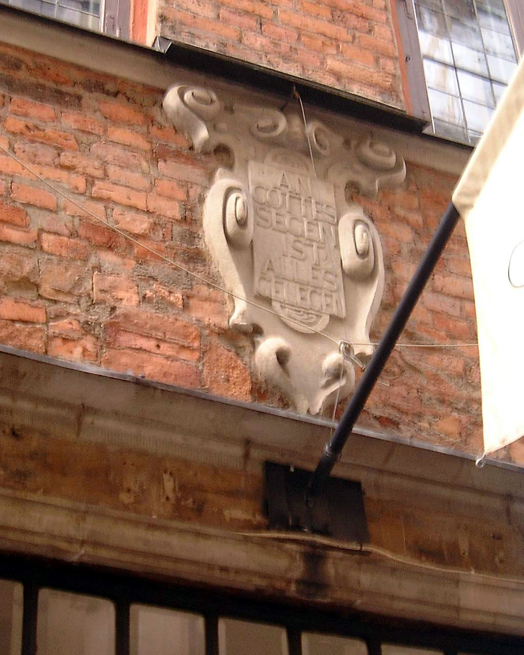 Escutcheon on 68, Västerlånggatan. Gamla stan, Stockholm. Von der Lindeska huset, Västerlånggatan 68.